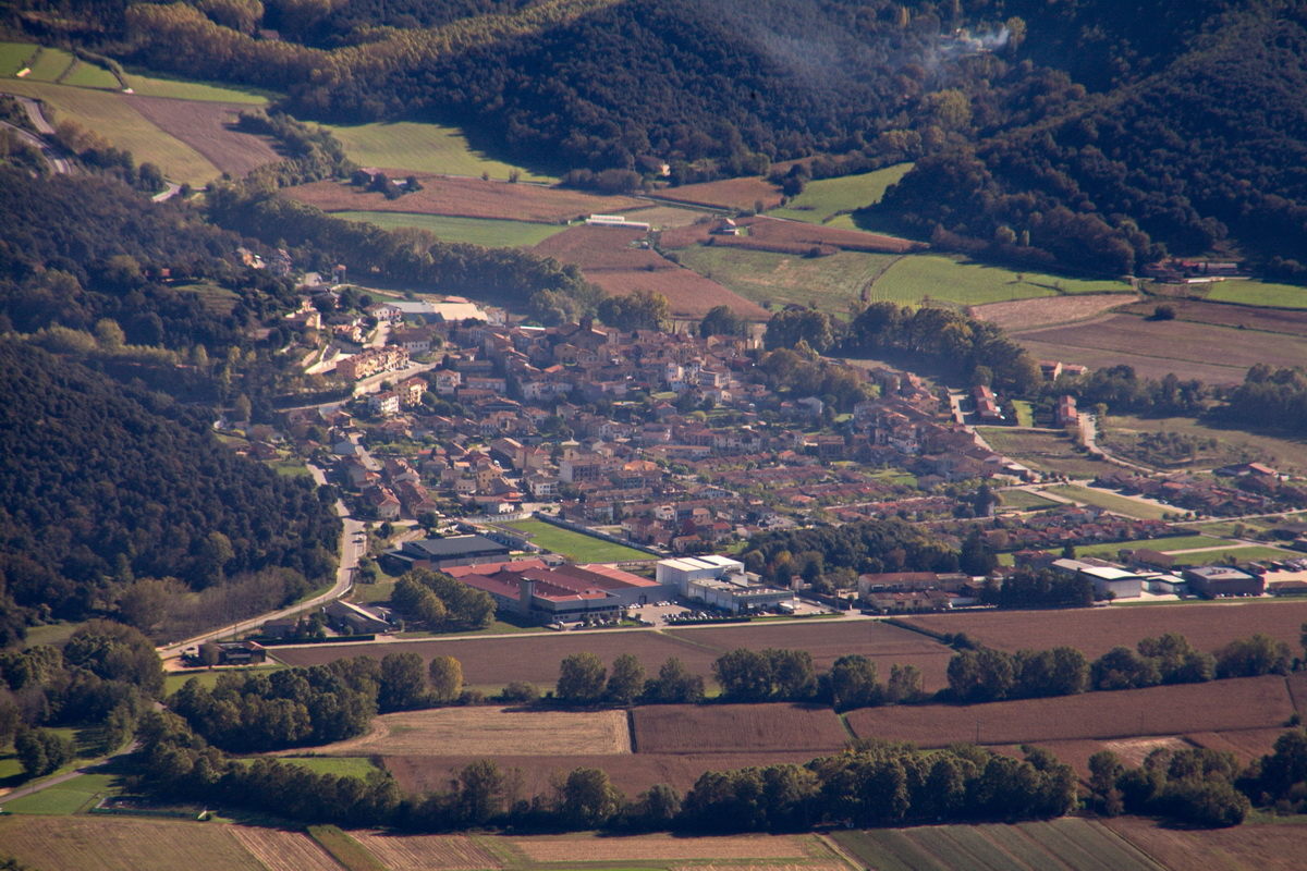 La vila de Sant Esteve d'en Bas vista des del Puigsacalm